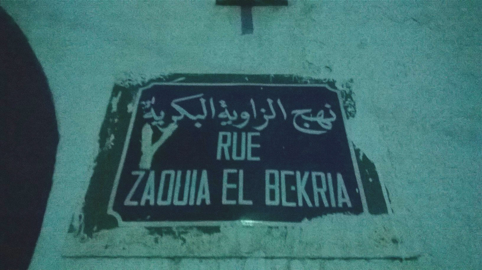 Bab Souika , Tunis